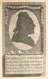 Johann Leberecht Schmucker; Radierung